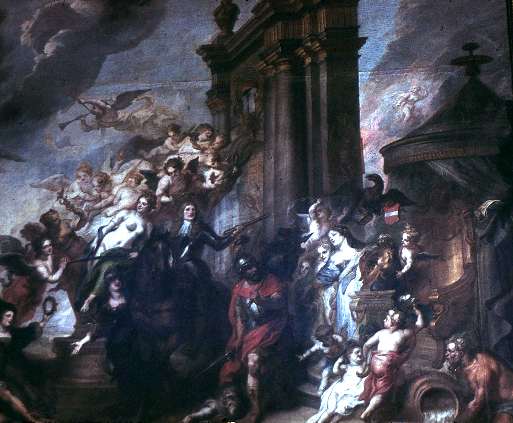 Allegorie auf den Frieden von OlivaAllegory of the Peace of Oliva in 1660